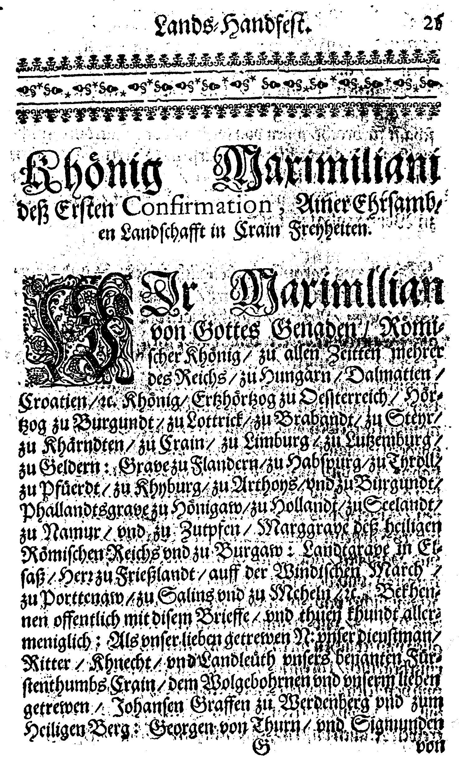 Deželni ročin kralja Maksimilijana I. za Kranjsko, prva stran. Na zadnji strani datirano z dne 1494. Tekst je ponatis iz leta 1687.